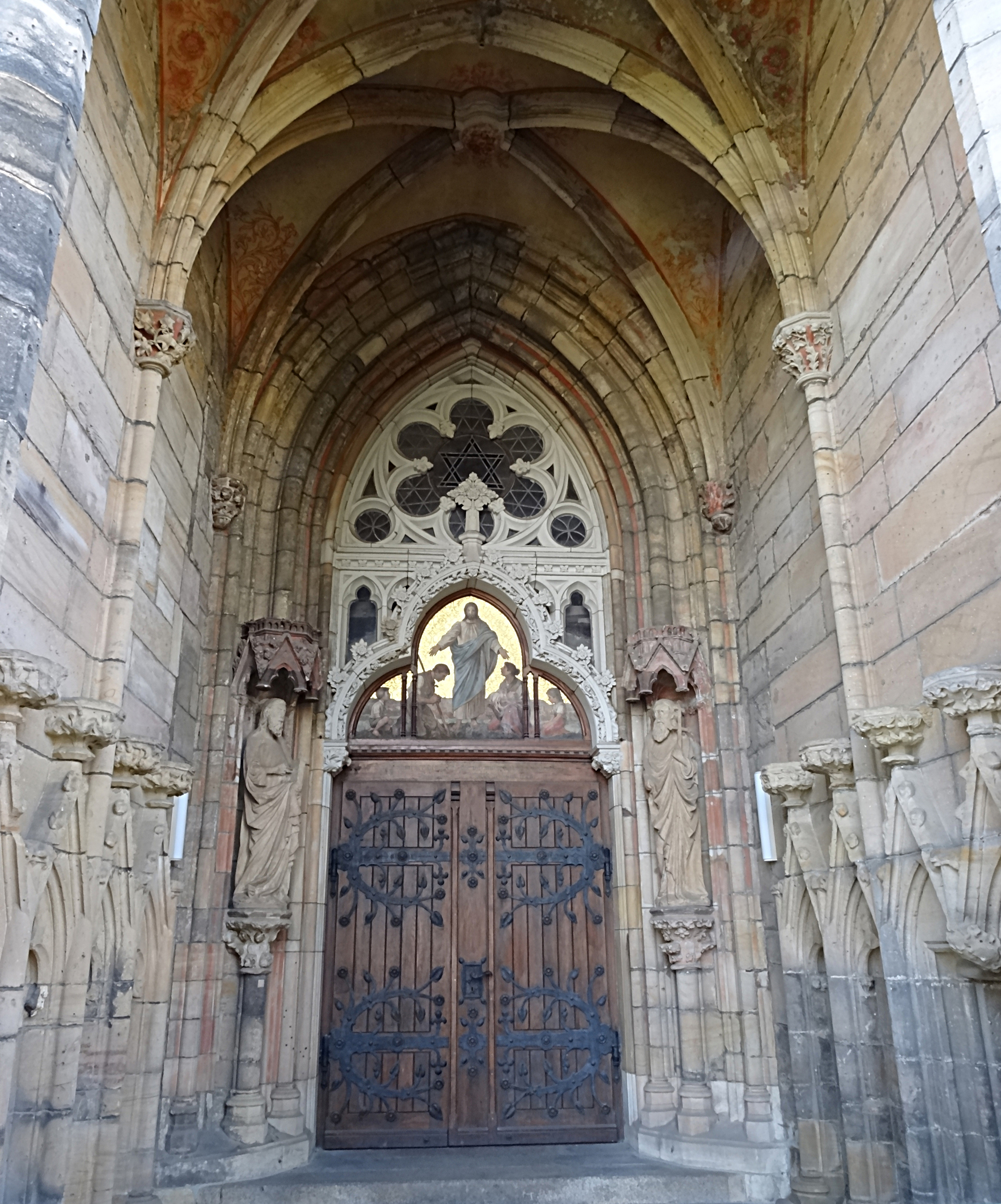 Stadtkirche St. Marien Stadtilm, Nordportal mit Außengemälde